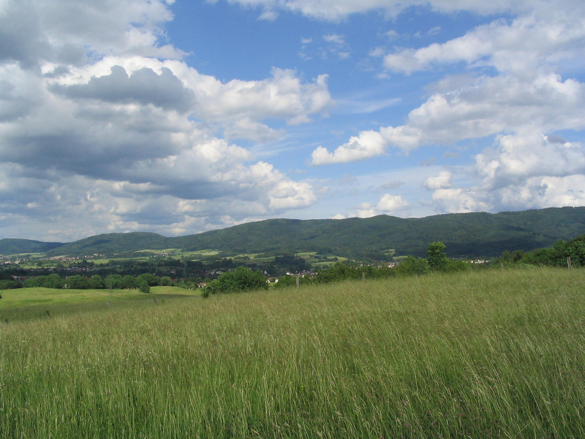 Nördliche Tromm-Gebirgskette (Odenwald): Krehberg (399 m), Erzberg (475 m), Wagenberg (536 m), Fahrenbacher Kopf (529 m), Übergang zur Tromm- Blick von Weschnitztal (Harzofen) aus.